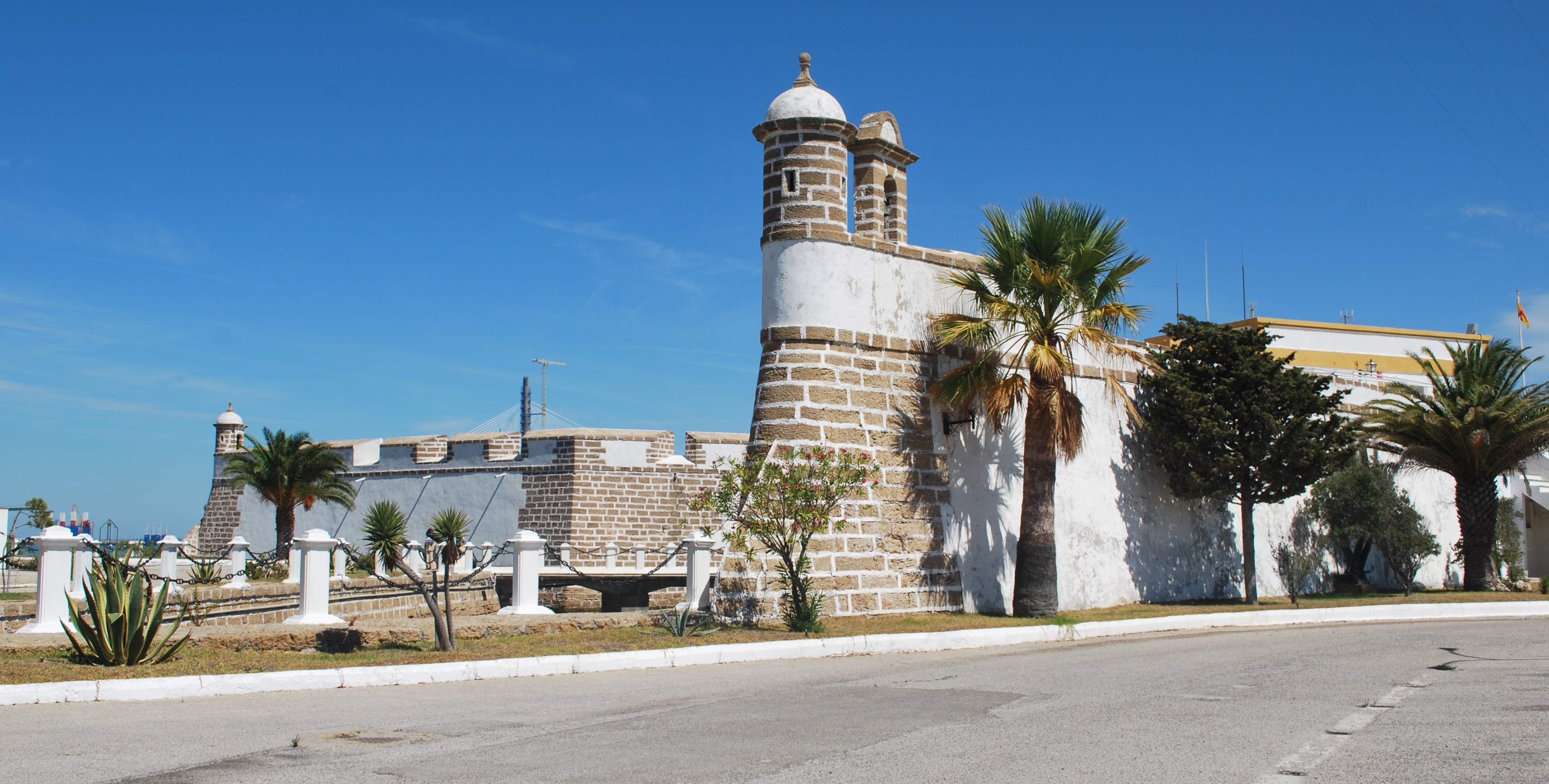 Castillo de San Lorenzo del PuntalCastillo de Puntales